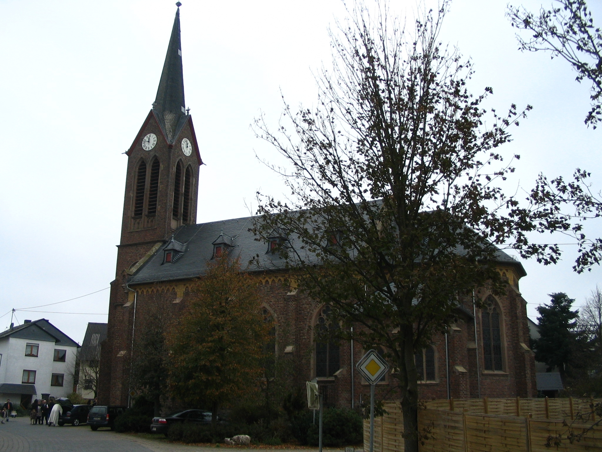 kath. Kirche im Dorfzentrum